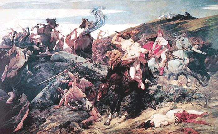 Pentesilea - Cuadro del pintor venezolano Arturo Michelena.